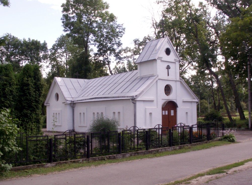 Rėkyvos koplyčia